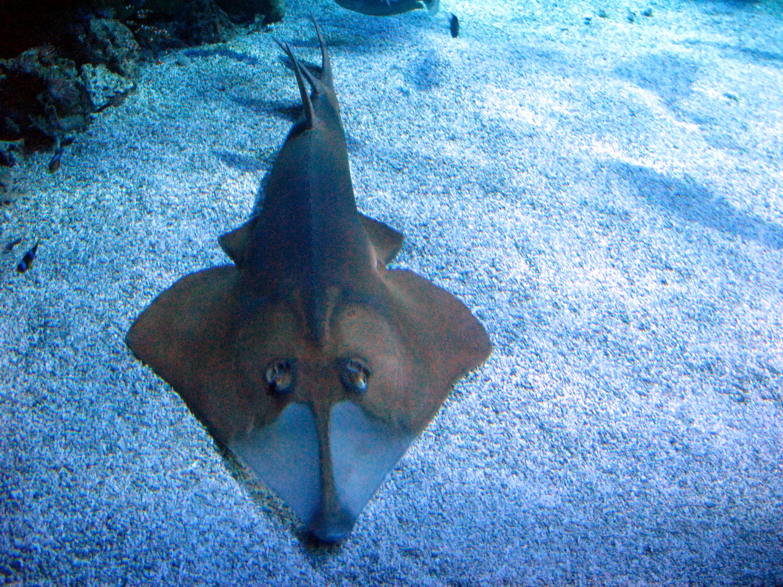 Raie requin (rhinobatos cemiculus), musée océanographique de Monaco.